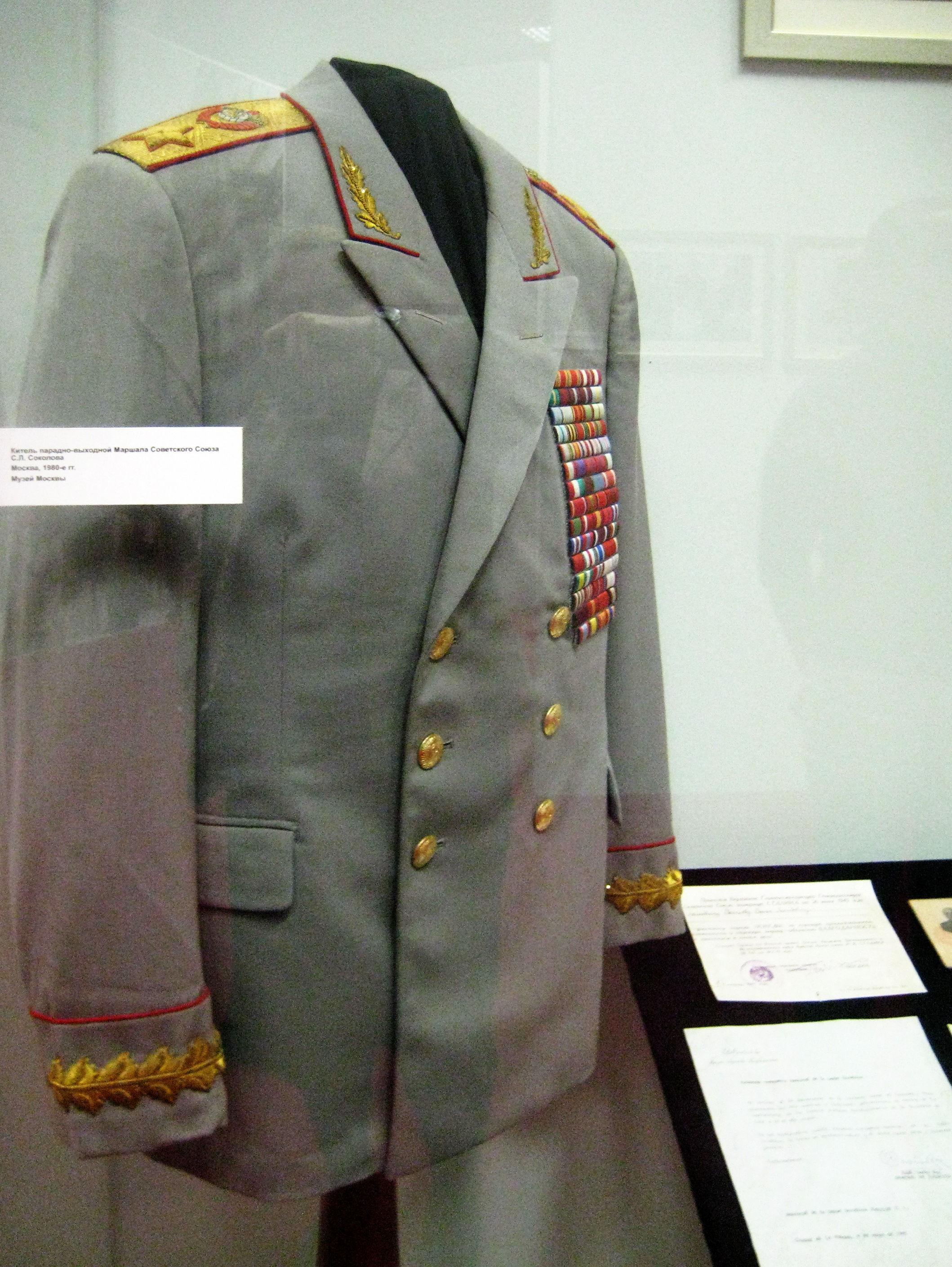 Музей Москвы (Провиантские склады)